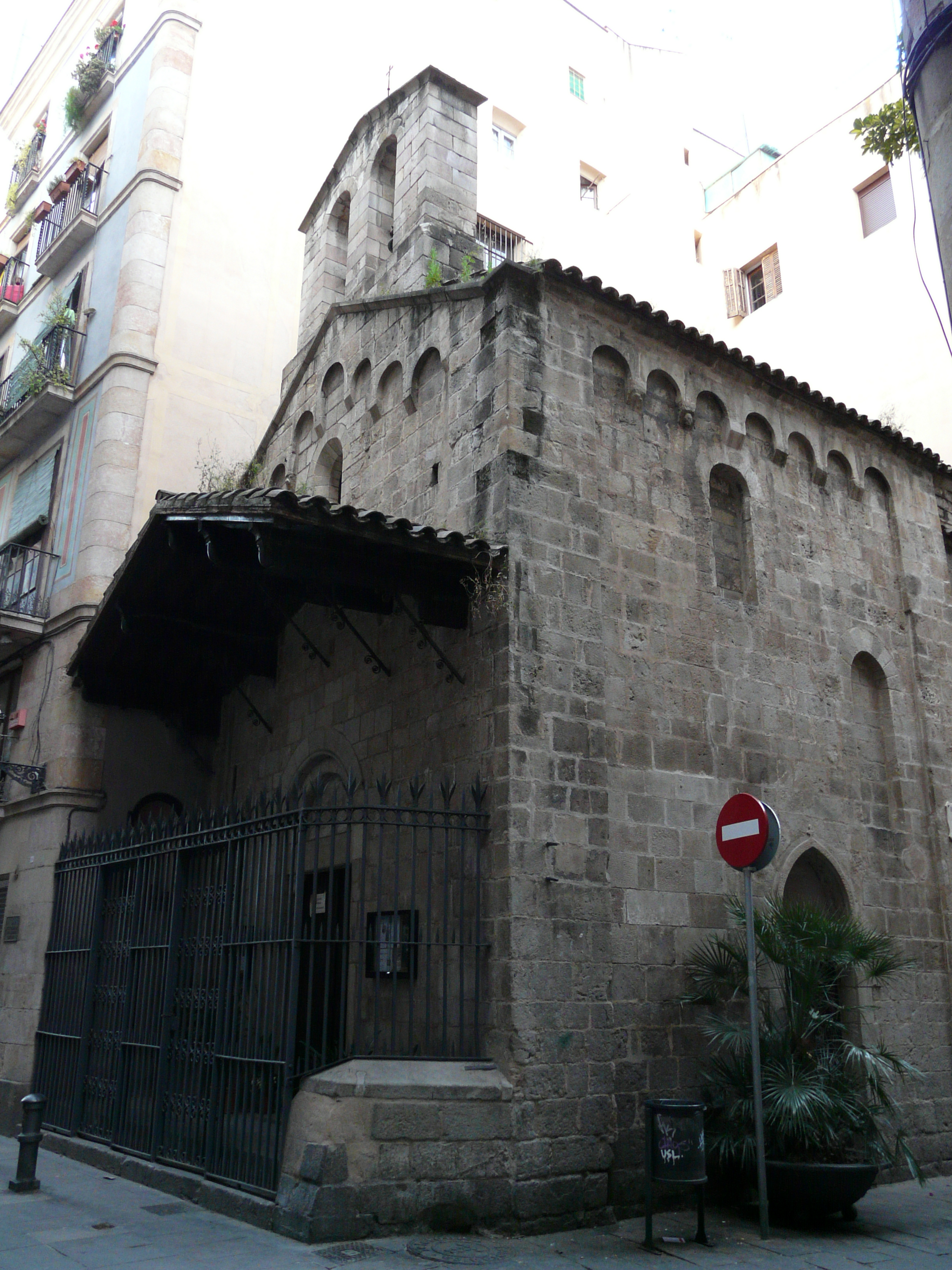 Capella de la Mare de Déu de la Guia (Barcelona) Object location41° 23′ 08.86″ N, 2° 10′ 47.69″ E